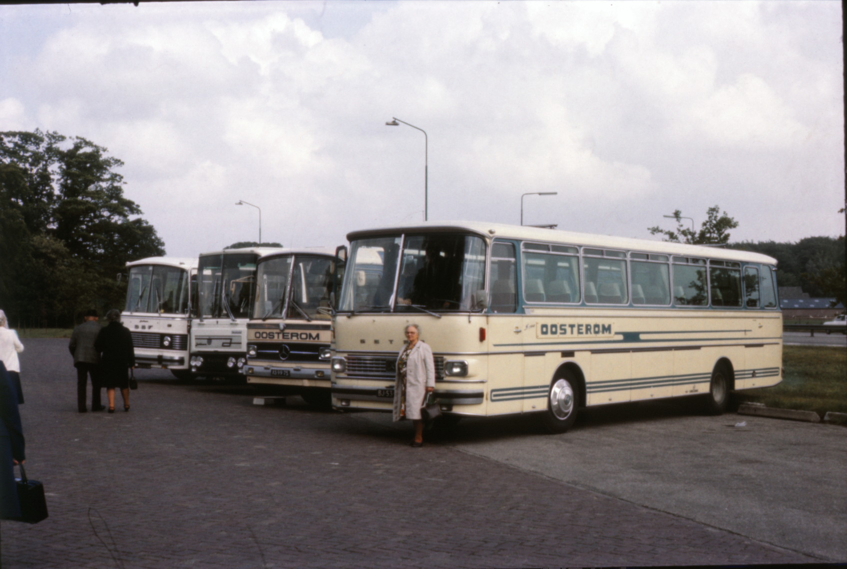 Oosterom Setra Mercedes-Benz Bus jaren 70